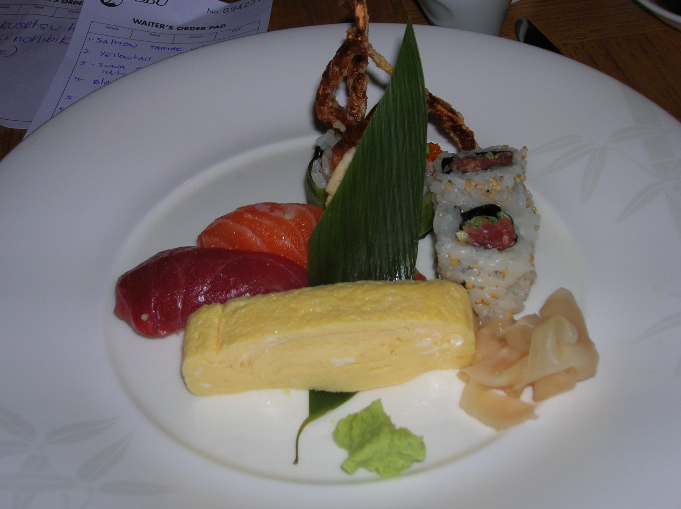 רולים וסשימי עם טמאגו במסעדת נובו, פארק ליין, לונדון